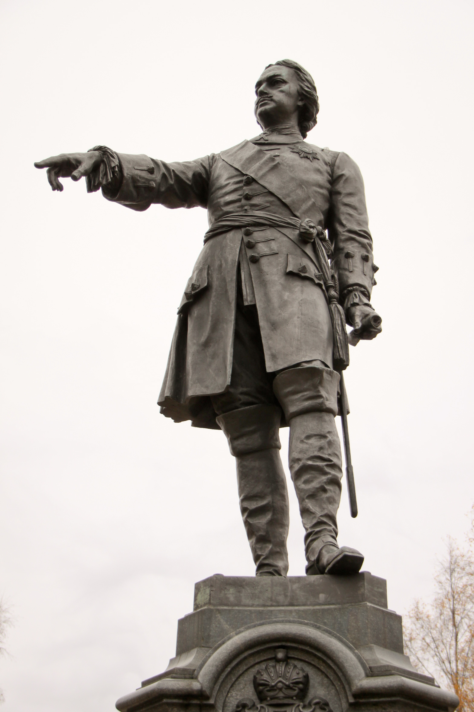 Памятник Петру I (Петрозаводск)